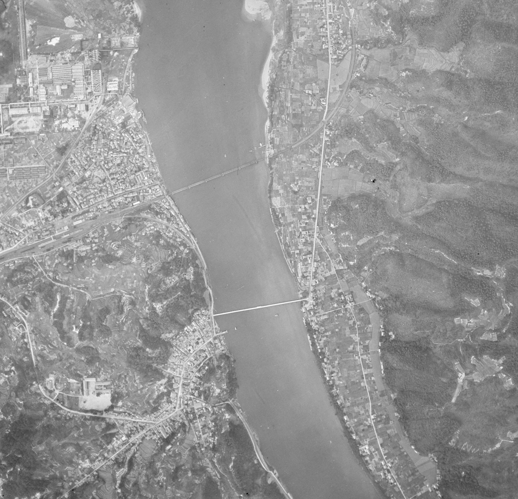 1947年島根県江津市の江川橋周辺